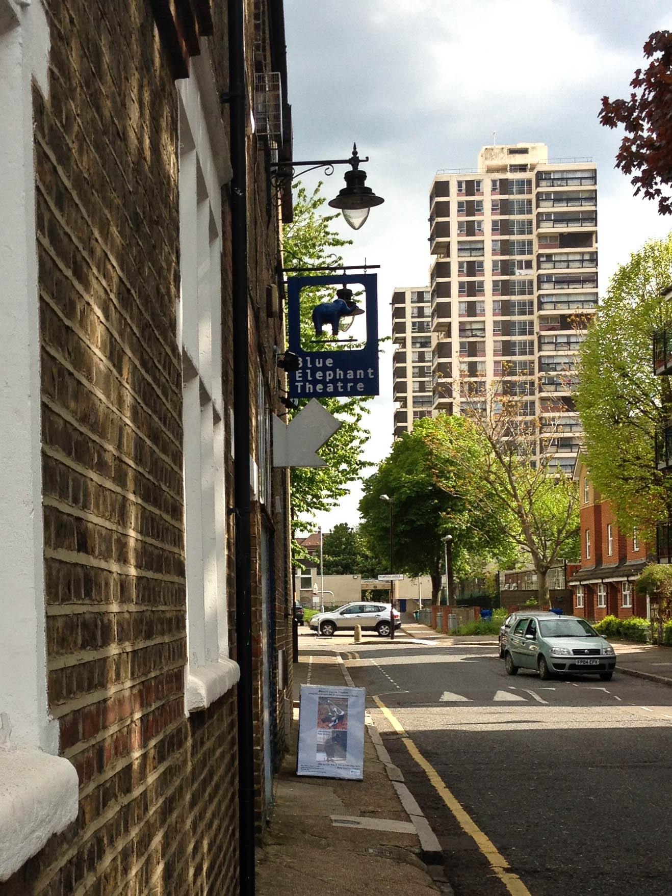 Camberwell SE5.